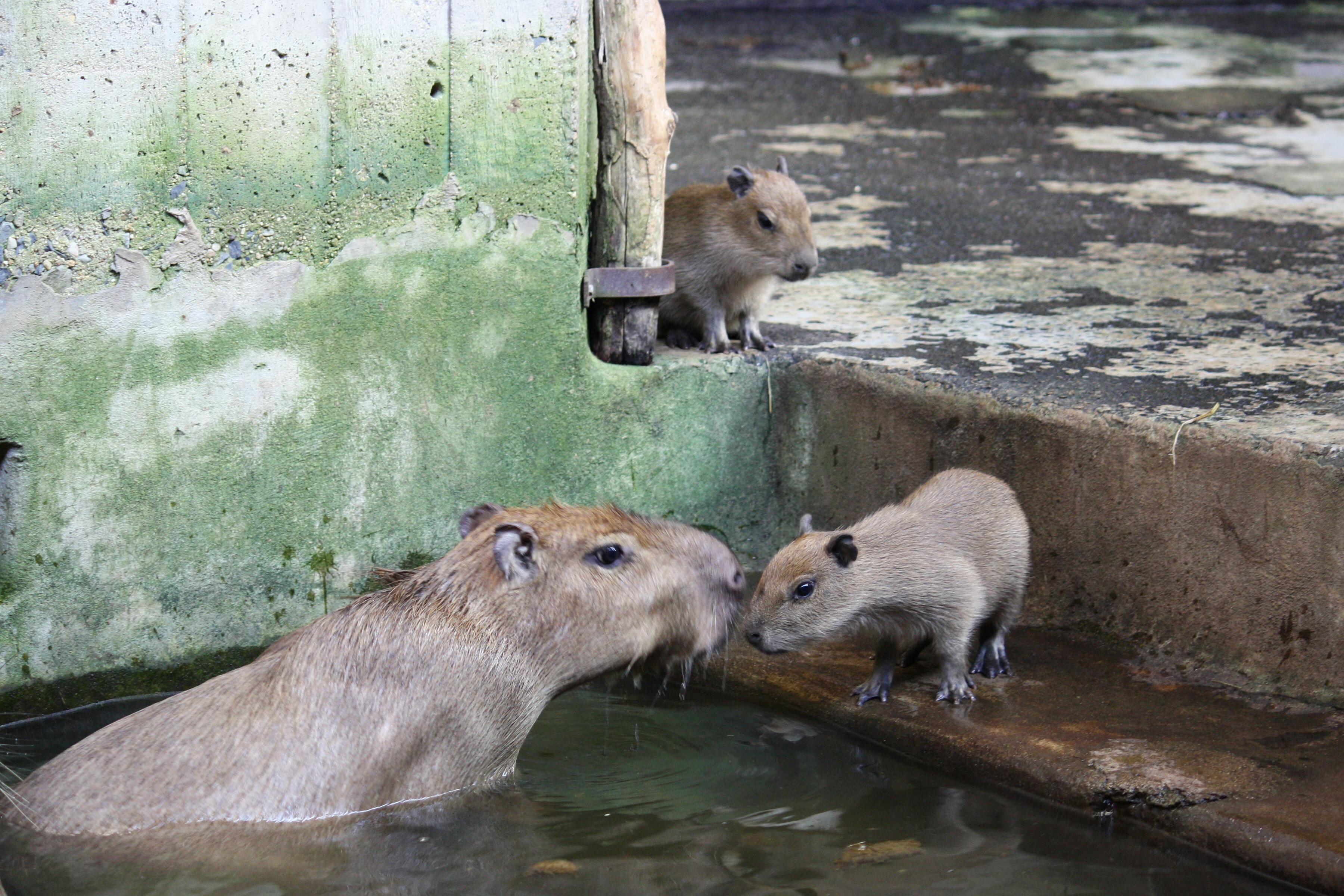 Kapybary v Pražské Zoo